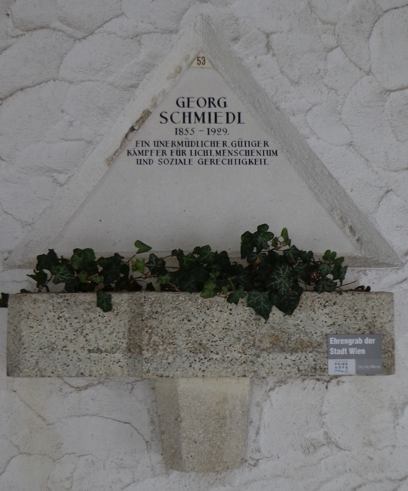 Feuerhalle Simmering - Arkadenhof (Abteilung ALI) - Urnengrab von Georg Schmiedl